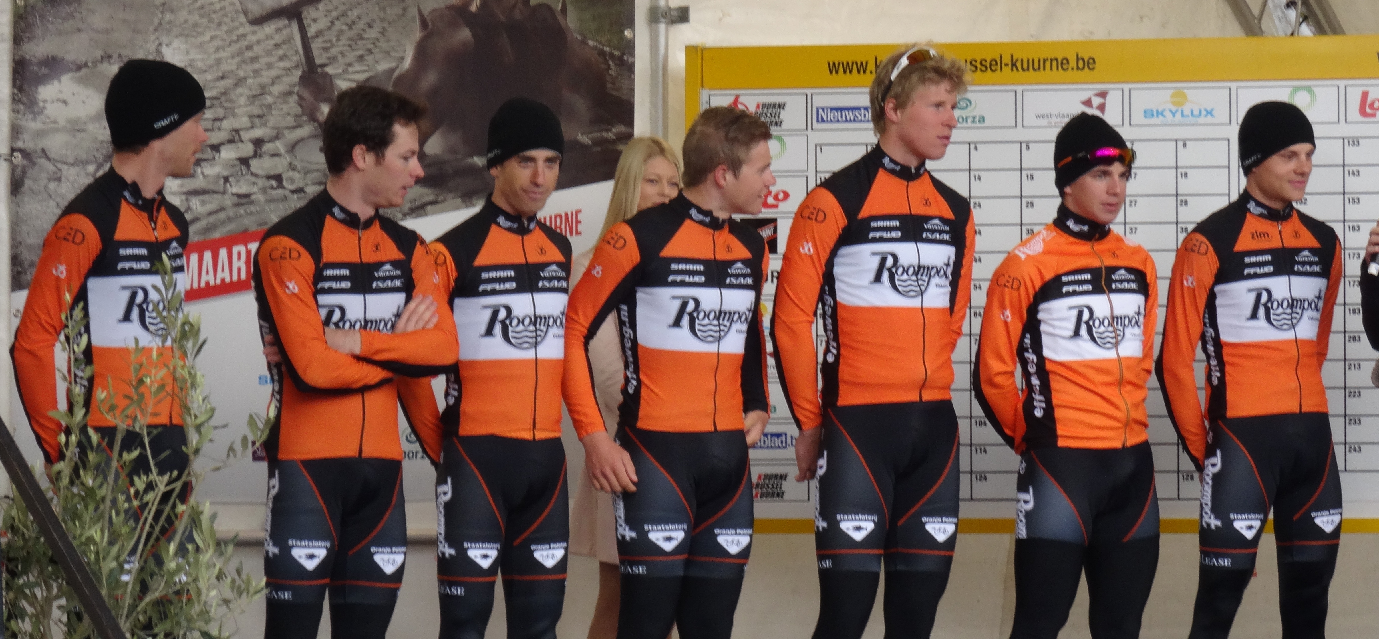 Reportage réalisé le dimanche 1er mars à l'occasion du départ et de l'arrivée de Kuurne-Bruxelles-Kuurne 2015 à Kuurne, Belgique.